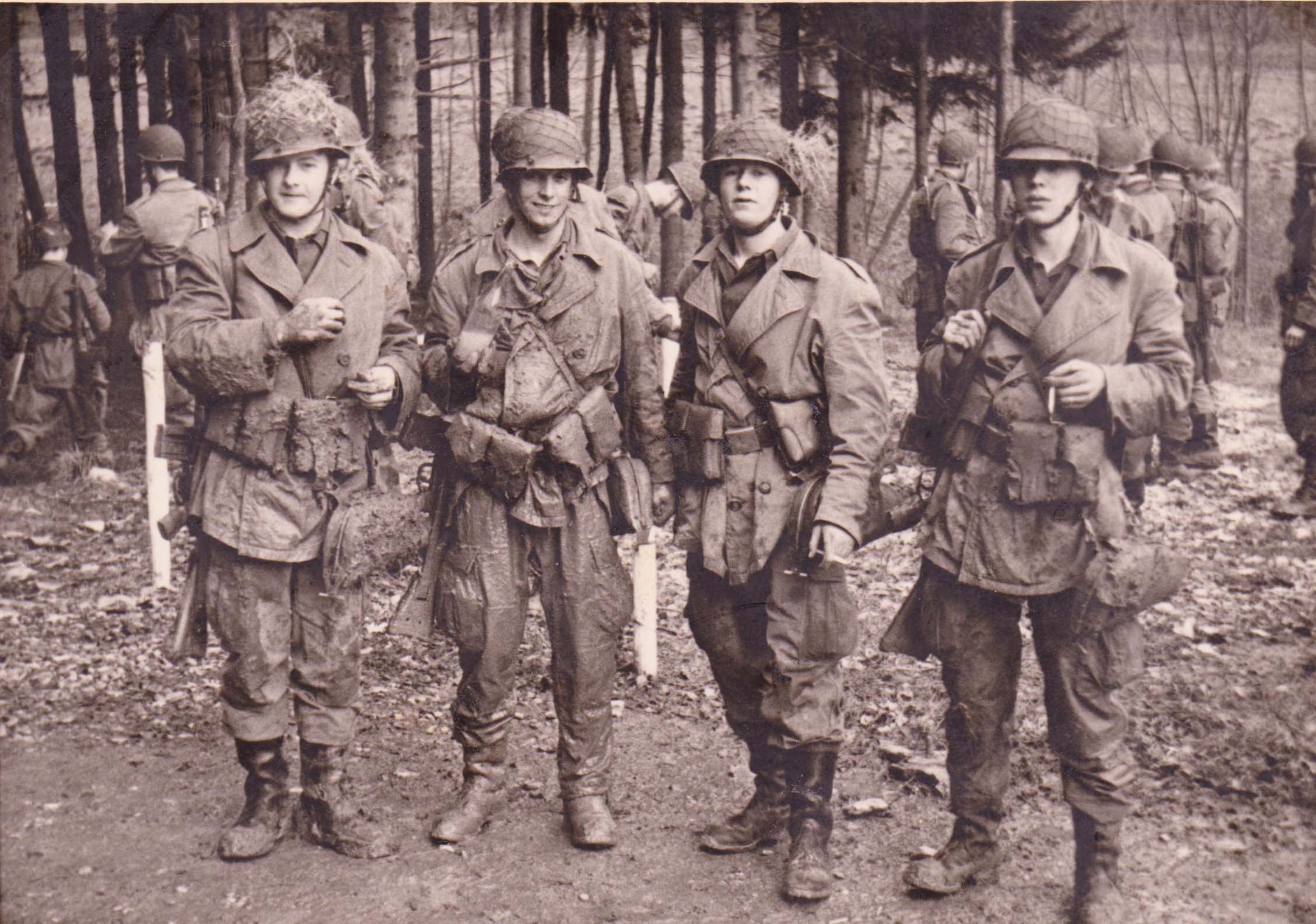 Panzergrenadiere der Bundeswehr 1968 Standortübungsplatz Donauwörth